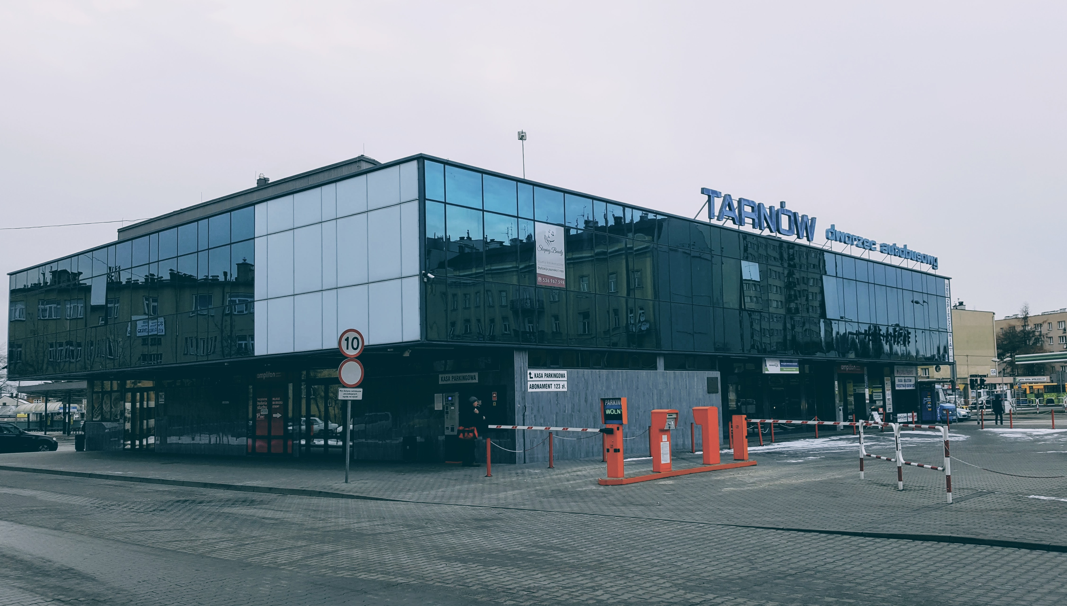 Dworzec autobusowy w Tarnowie